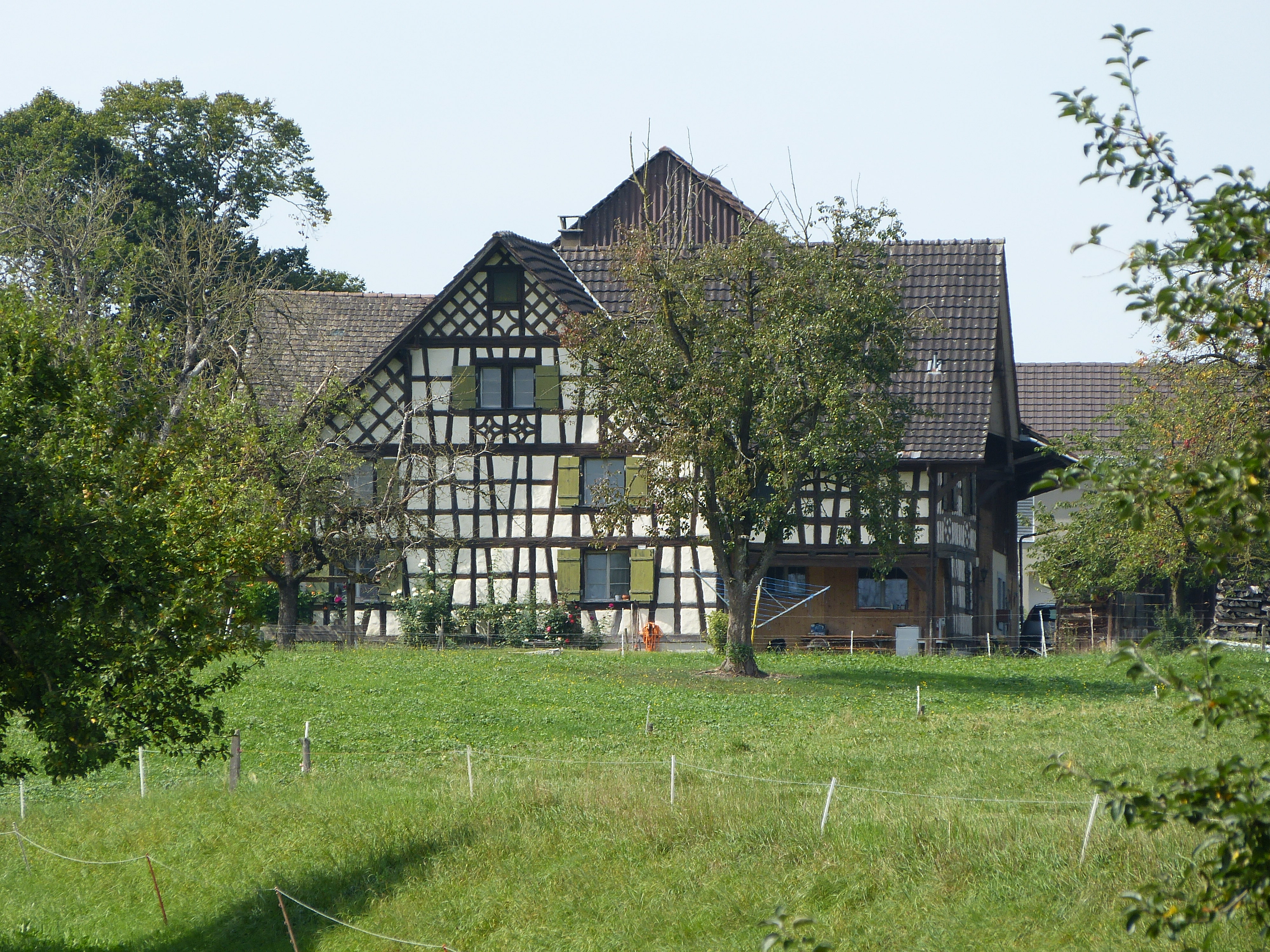 Bauernhaus